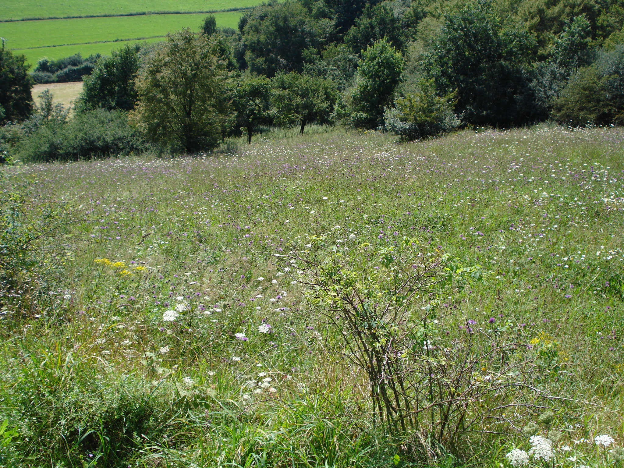 der Magerrasen der Steinert im August 2007, Blühaspekt